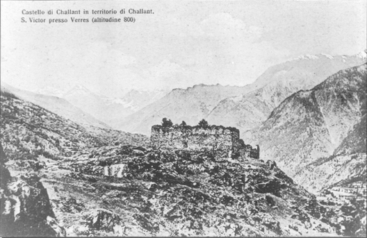 Panorama del Castello di Villa nella Valle di Challant, Challant Saint-Victor, Valle d'Aosta, Italia. Da una cartolina del 1900-1920, nota anteriore: "Castello di Challant in territorio di Challant S. Victor presso Verres (altitudine 800), ed E. Genta, formato 9X14, collezione BREL, fototipia, retro 3/4 verde, n.204.